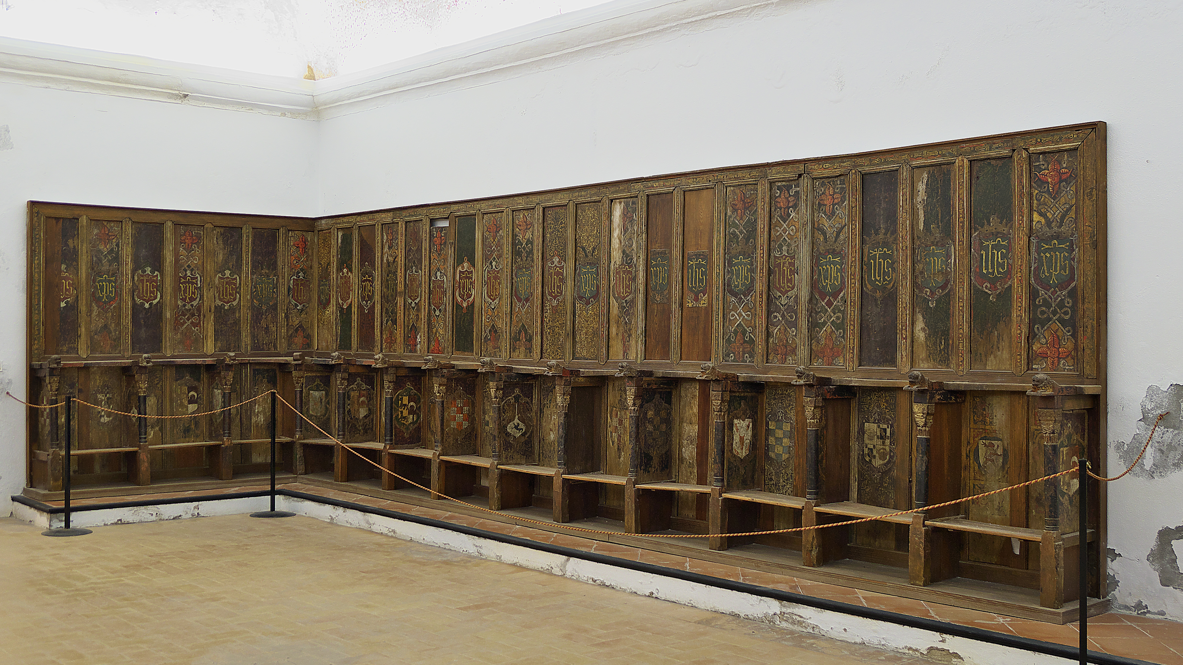 Parte de la sillería del coro bajo, tercer cuarto del siglo XIV, pintado posteriormente. Afortunadamente bien conservado y ocupando su primitivo lugar en el coro. Por su tipología, el único parecido es el del Monasterio de Santa María de Gradefes, del que existen tres sillas en el Museo Arqueológico Nacional, Madrid